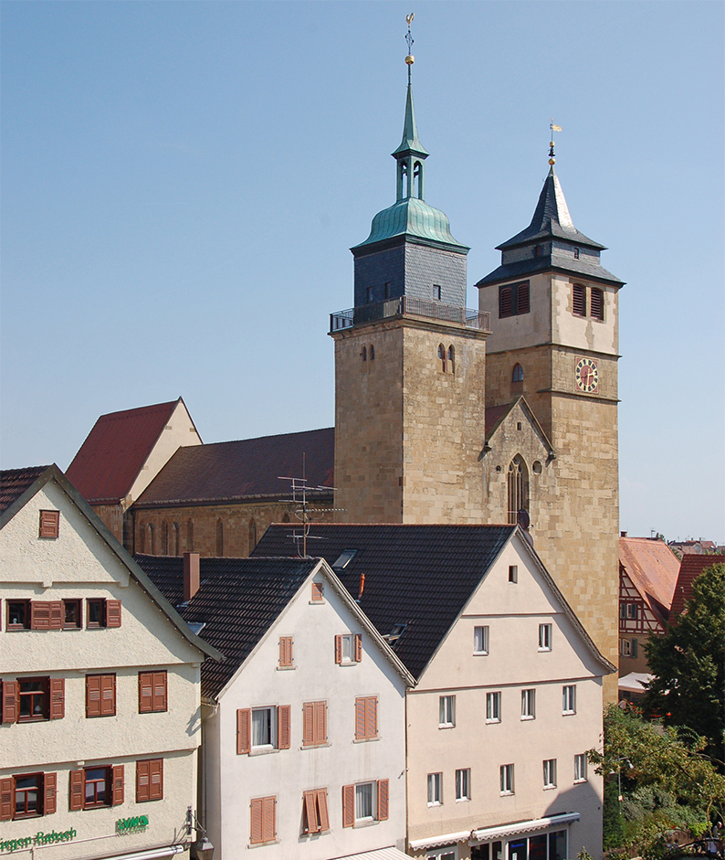 Bartholomäuskirche vom Markgröninger Rathaus (Ausschnitt)